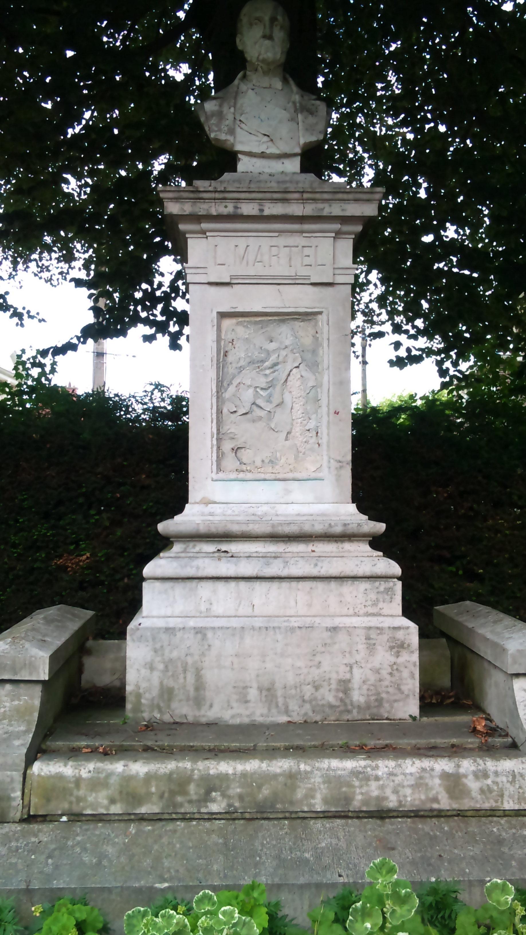 Stèle à Louis Martel - jardin publique de Saint-Omer